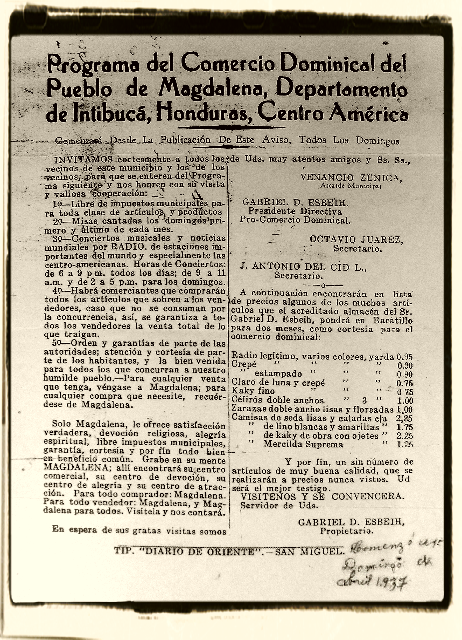 Programa del Comercio Dominical de Magdalena, Intibucá.